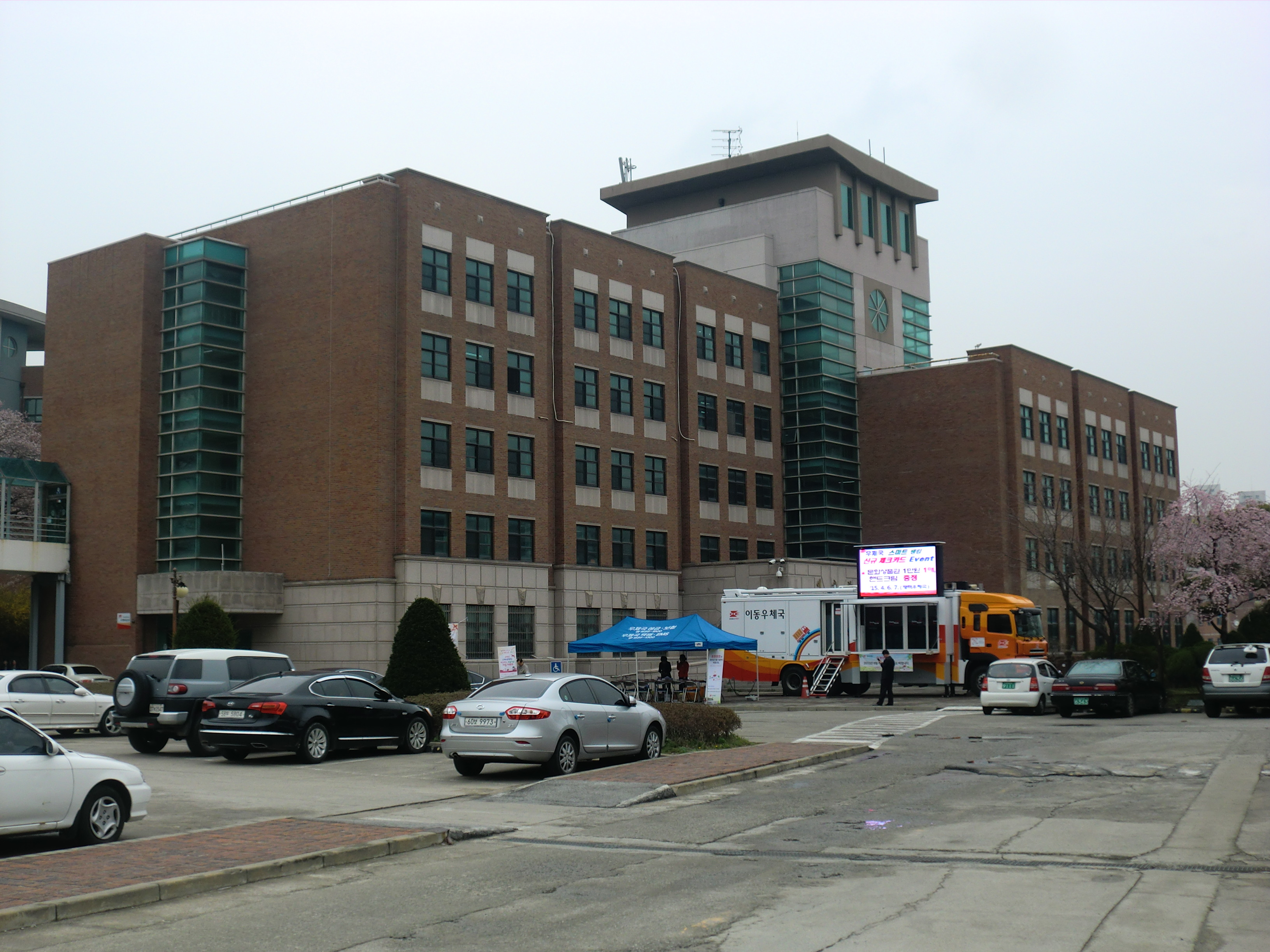 경기도 평택시에 있는 평택대학교 이공관